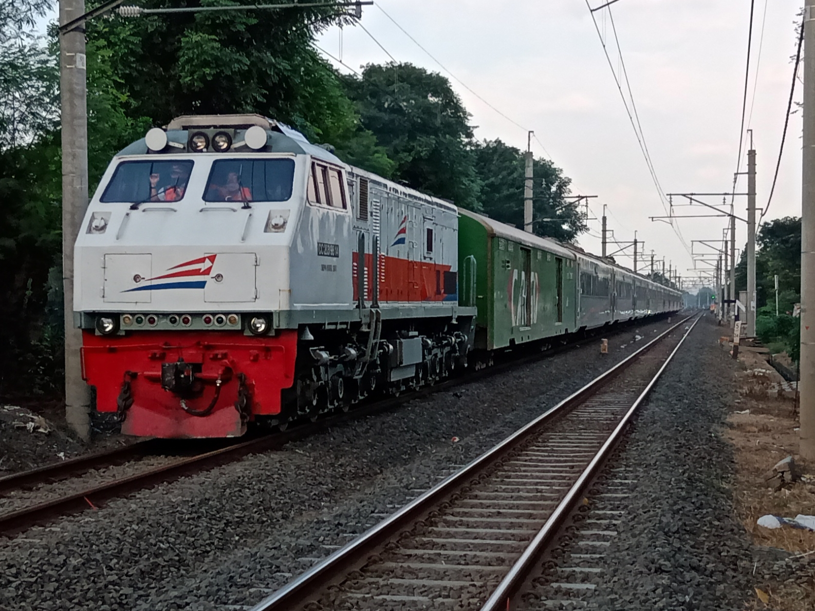 Ketika KA Mutiara Timur sedang meminjam Rangkaian KA untuk Dinas KLB (10477) relasi Surabaya Pasarturi-Gambir.